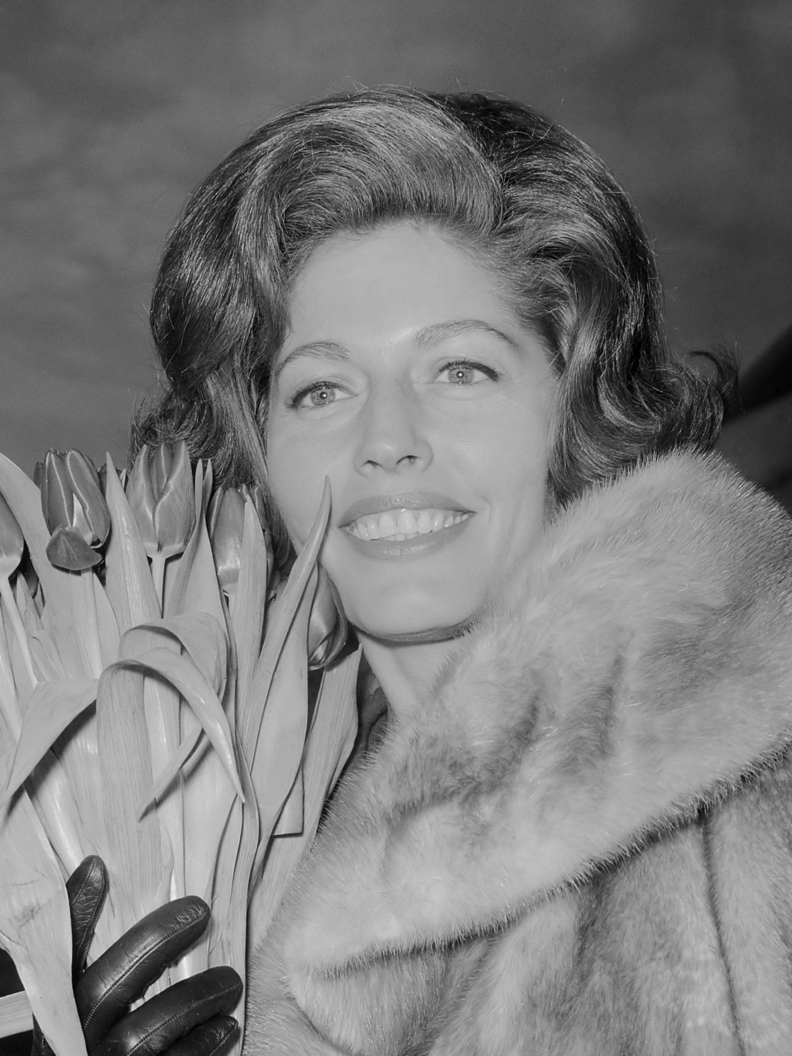 Aankomst Mrs. America 1966 , Alice Buehner op Schiphol 18 januari 1966